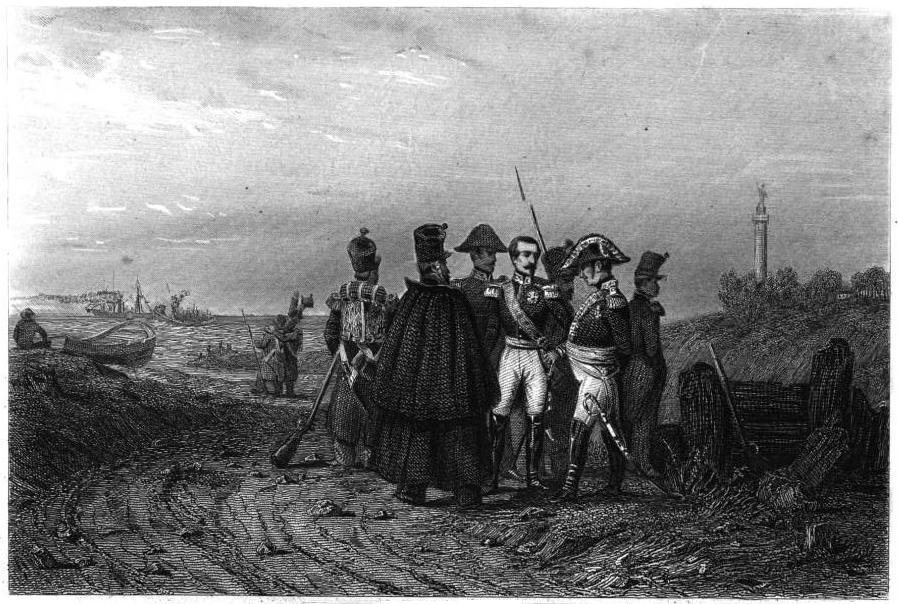 "Louis-Napoléon Bonaparte à Boulogne (Débarquement en Août 1840)".